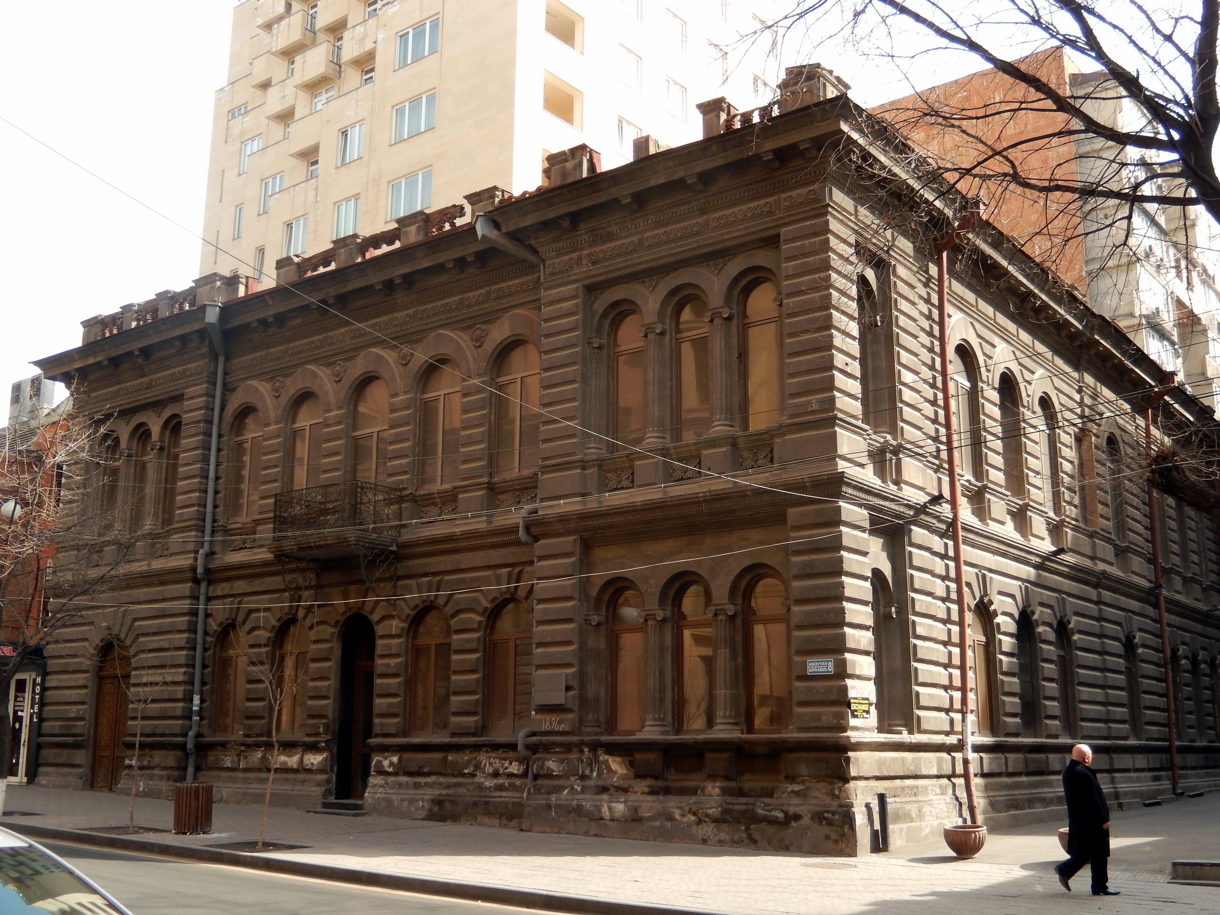 Գրիգոր Եղիազարյանի տունը, Աբովյան 8 6/178.4.9